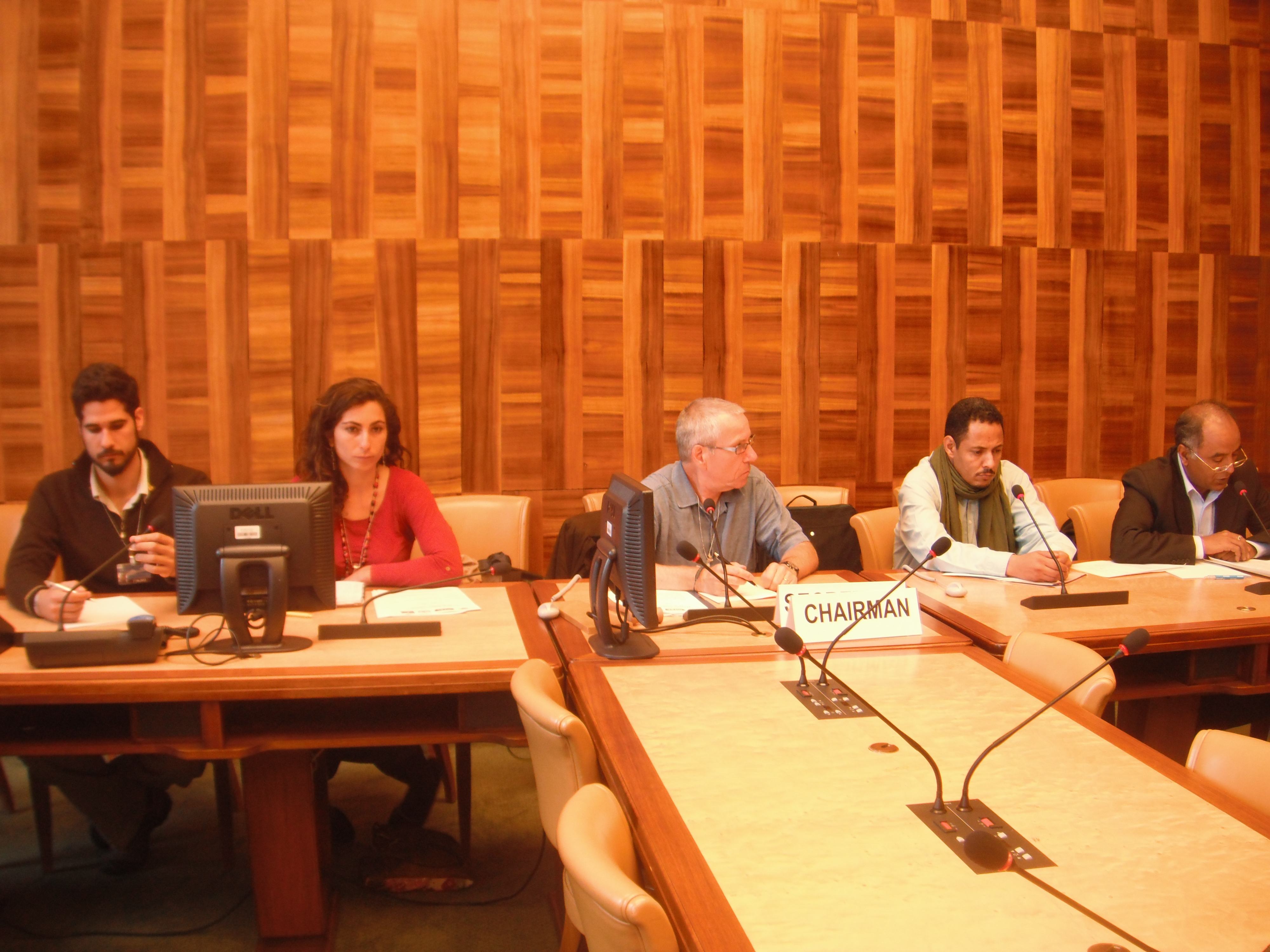 ONU, Ginebra-Consejo de DDHH